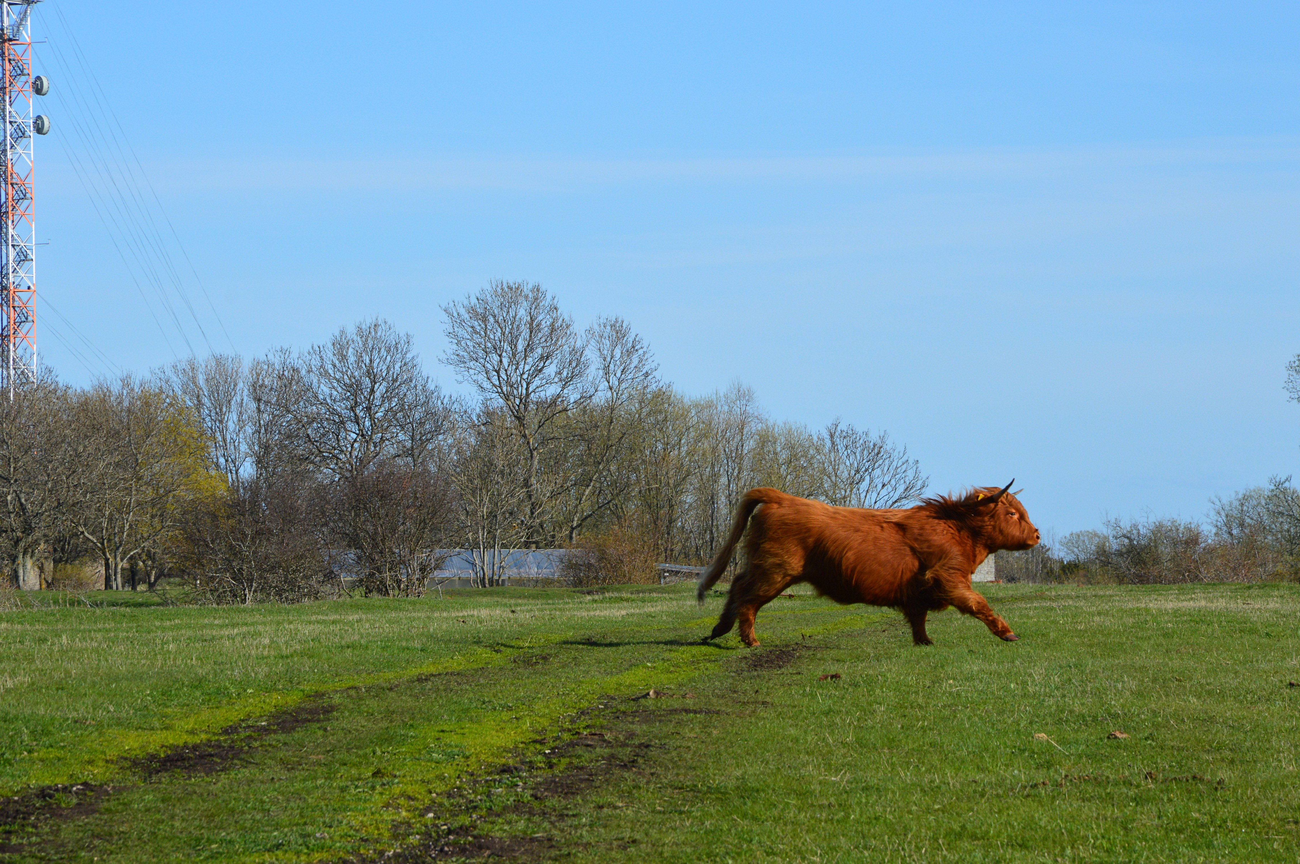 Šoti mägiveis Osmussaarel.